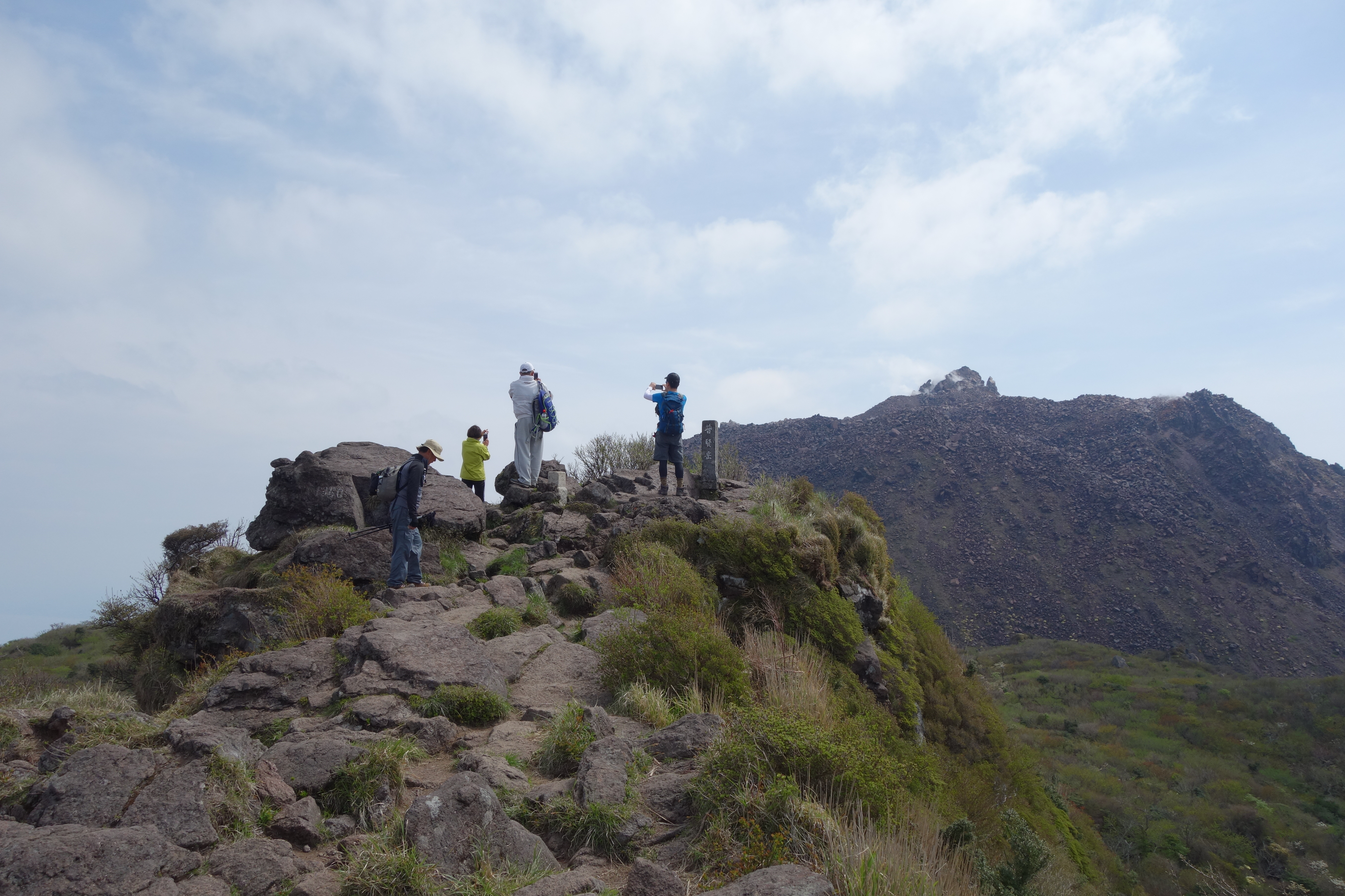 普賢岳から見た平成新山